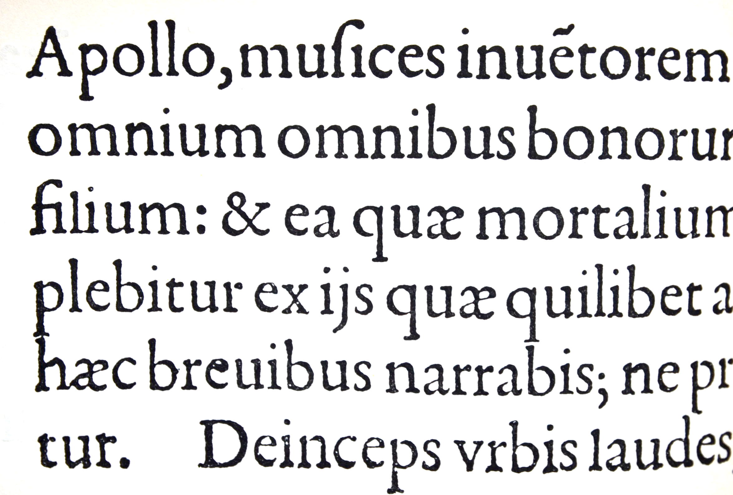 Přetisk písma z roku 1544, jehož autorem je pravděpodobně Claude Garamond